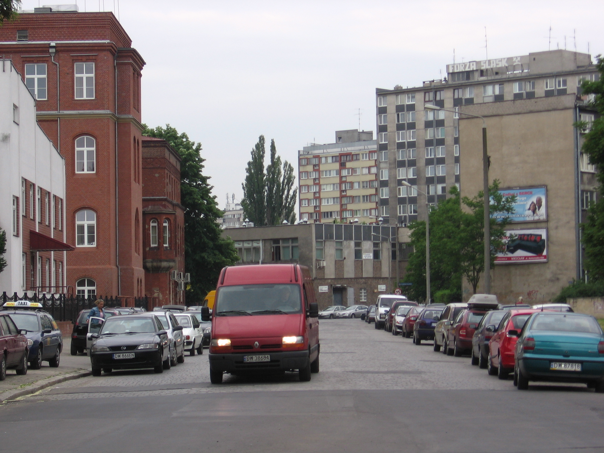 Ulica Tadeusza Zielińskiego we Wrocławiu, widok w kierunku placu Hirszfelda; po lewej ceglane zabudowania szpitala onkologicznego